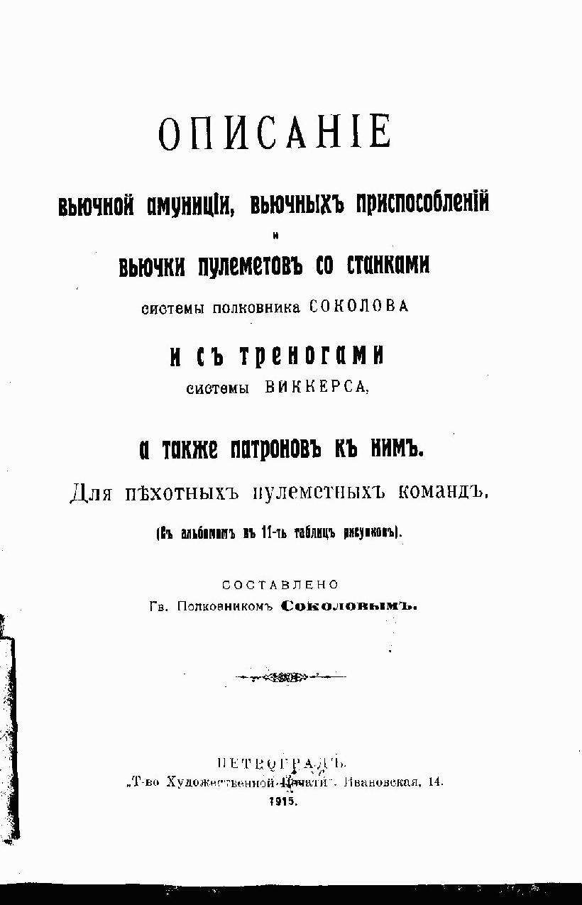 Александр Алексеевич Соколов (1869—1943) — генерал-майор Русской Императорской армии, бригадный инженер РККА, разработчик колесного станка для пулемёта Максима